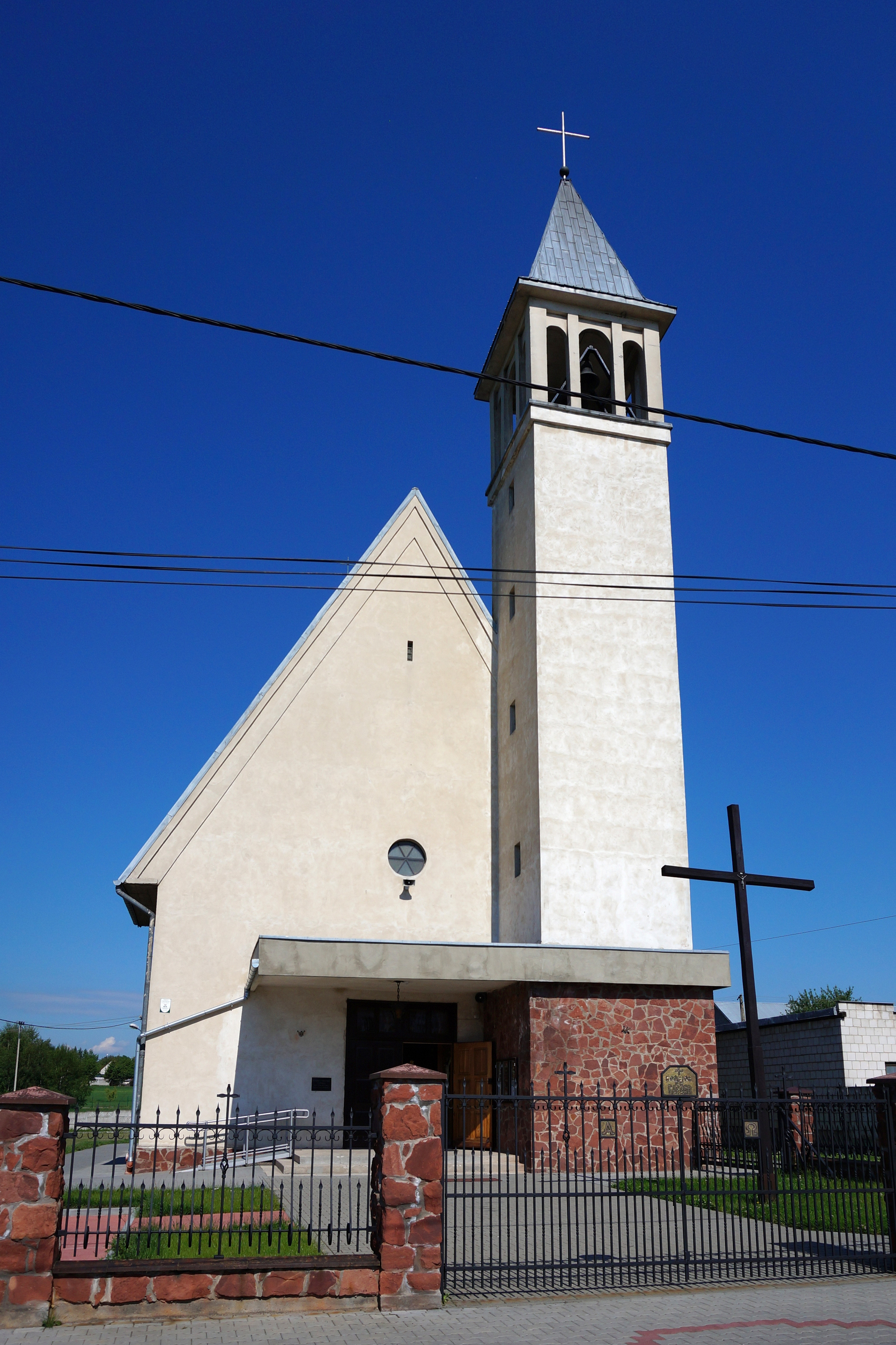 Widoma - Kościół św. Apostołów Piotra i Pawła.